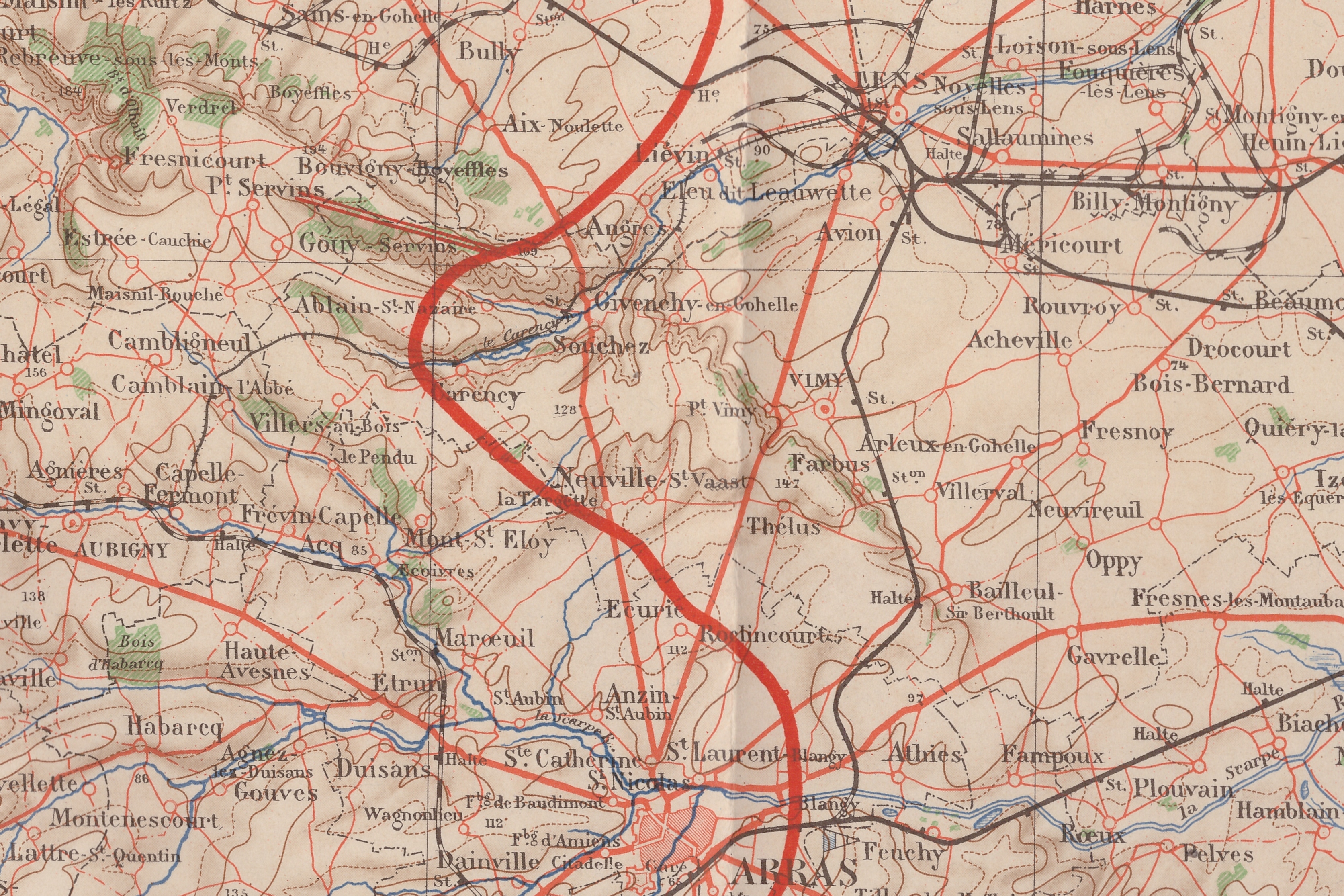 Carte du front de l'Artois au nord d'Arras, en janvier 1915